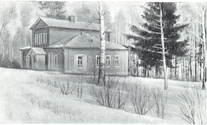 Дом Марии Львовны Толстой-Оболенской в Пирогове. Фотография М. Л. Оболенской, 1904